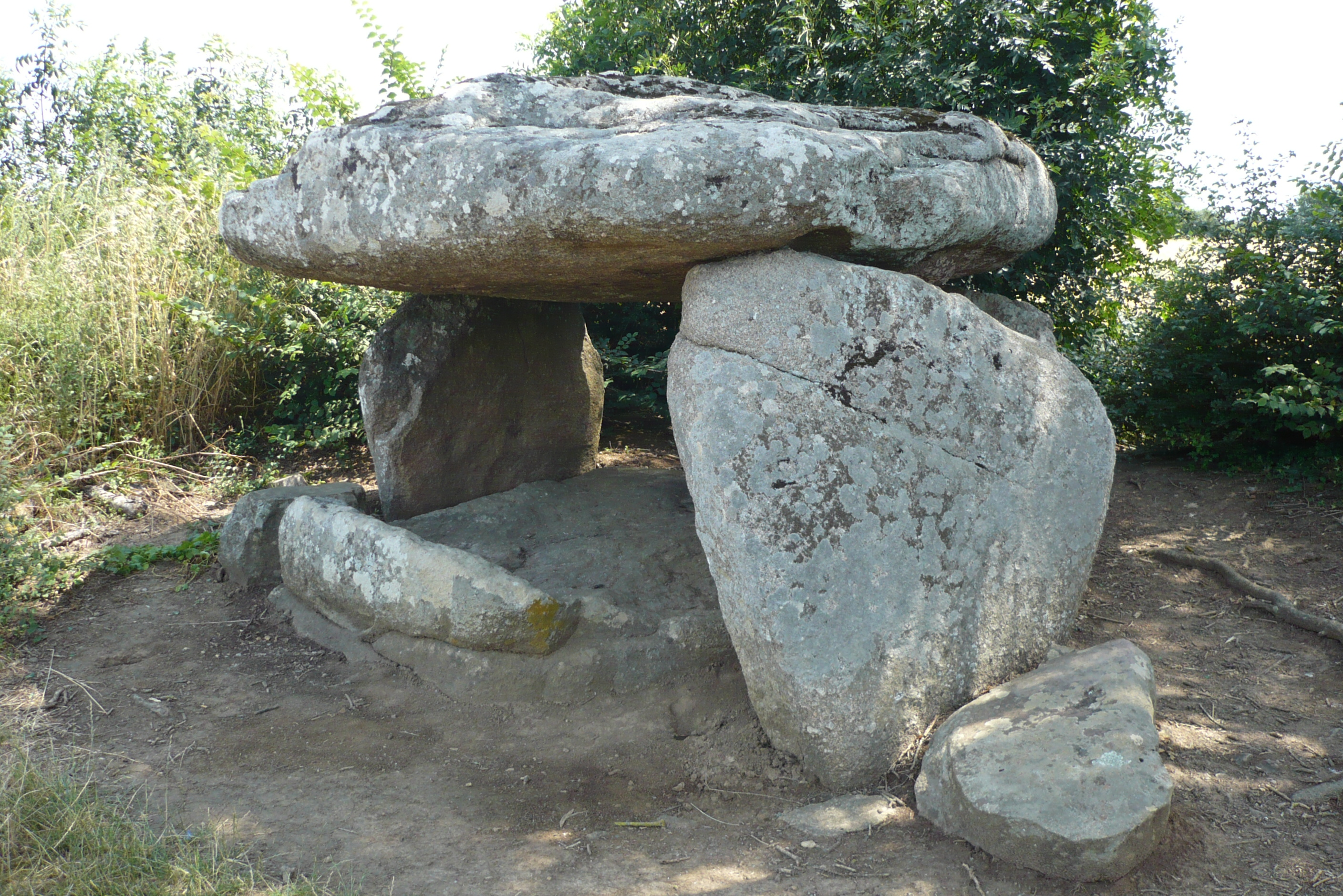 Dolmen de Savatole n°2. Le Bernard (85) France